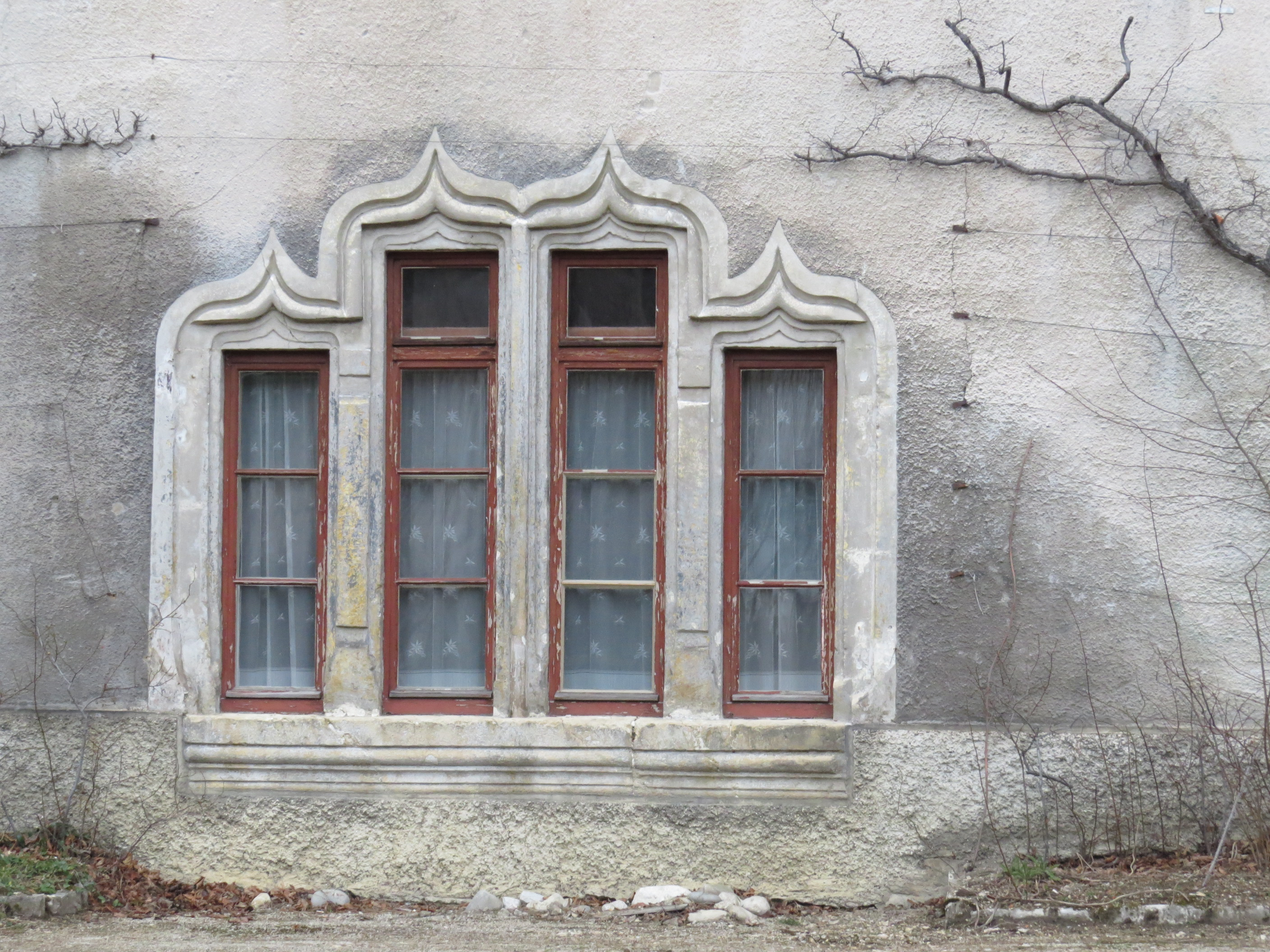 Encadrement de fenêtre du prieuré Saint-Pierre de Môtiers, façade sud